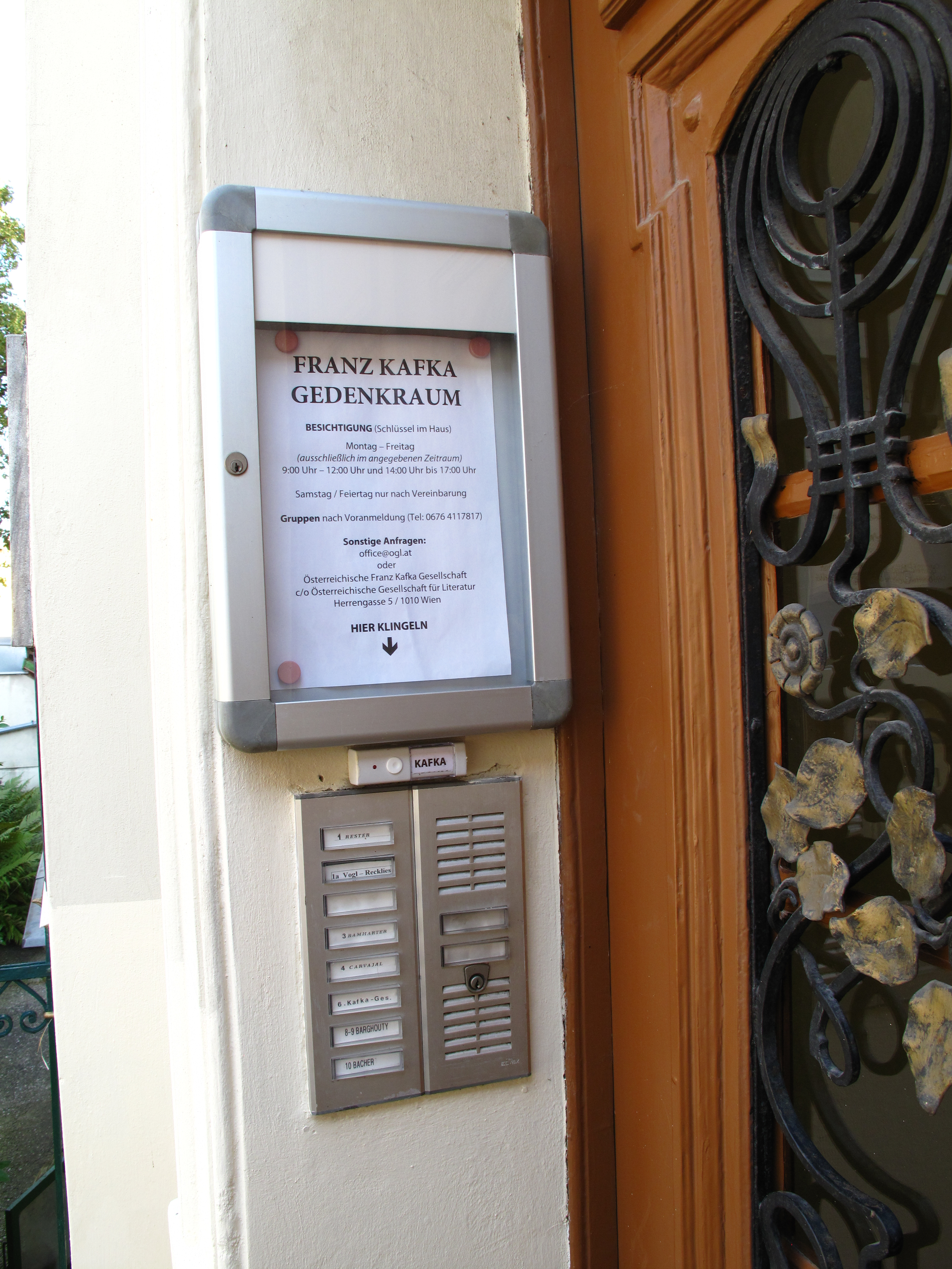 Ehem. Sanatorium Hoffmann, KafkaSterbehaus , Hauptstraße 187, 3400 Kierling, Austria Eingangsbereich zur Gedenkstätte